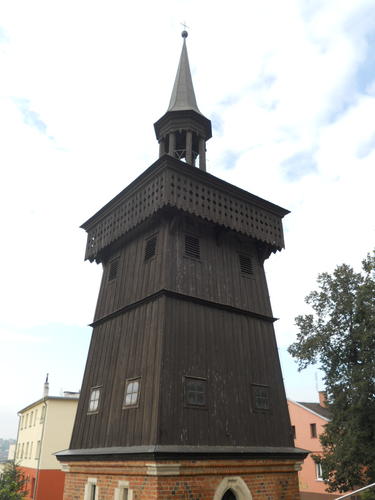 Dzwonnica przy kościele św. Małgorzaty w Raciborowicach.